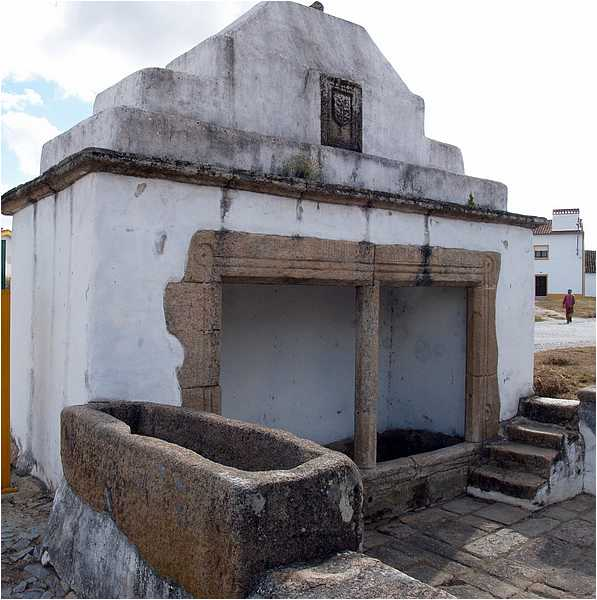 Flor da Rosa: fontaine publique